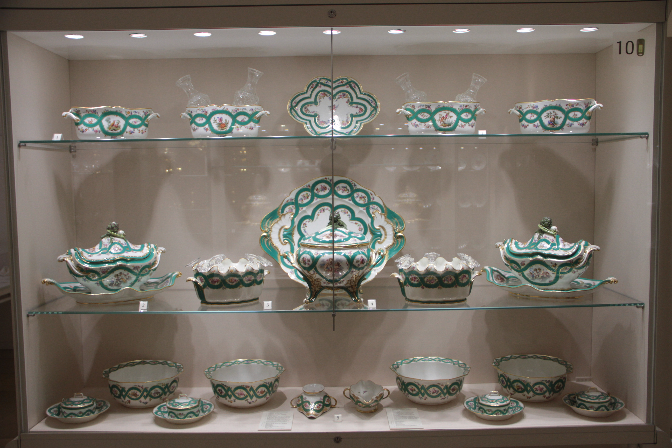 Серебряная палата, Императорские апартаменты, Хофбург, Вена